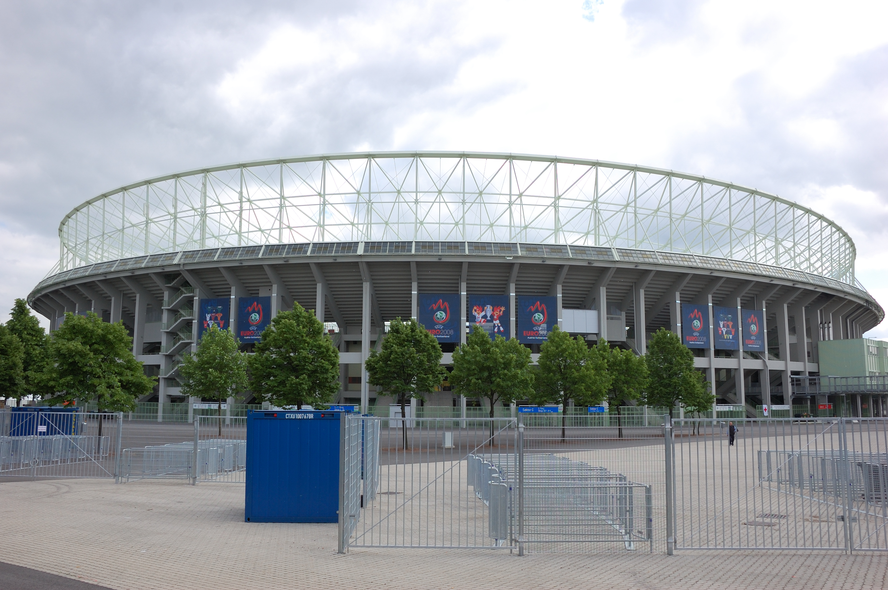 Ernst-Happel-Stadion